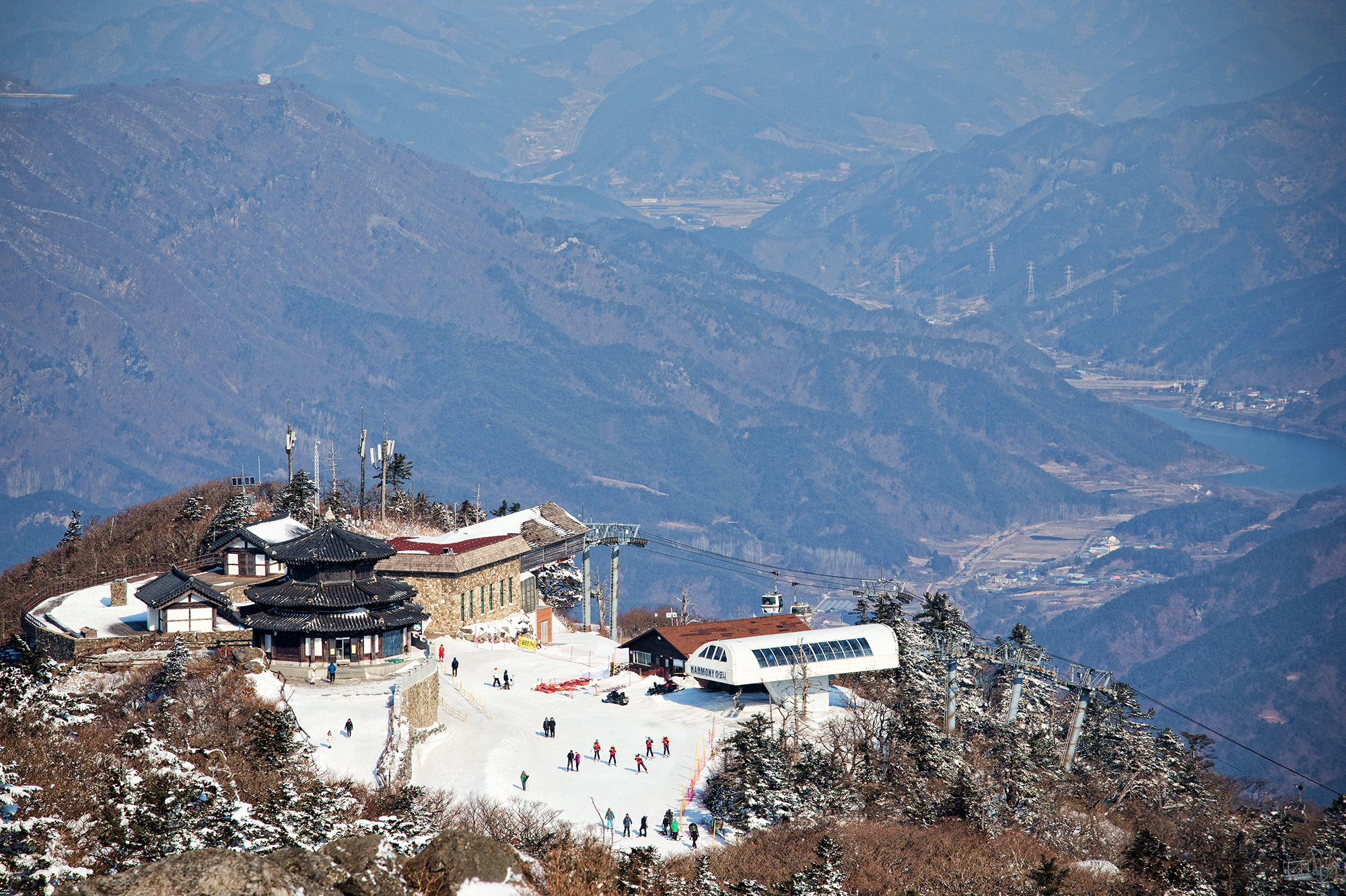 향적봉에서 바라본 설천봉 #WLE2017 #WLEKorea